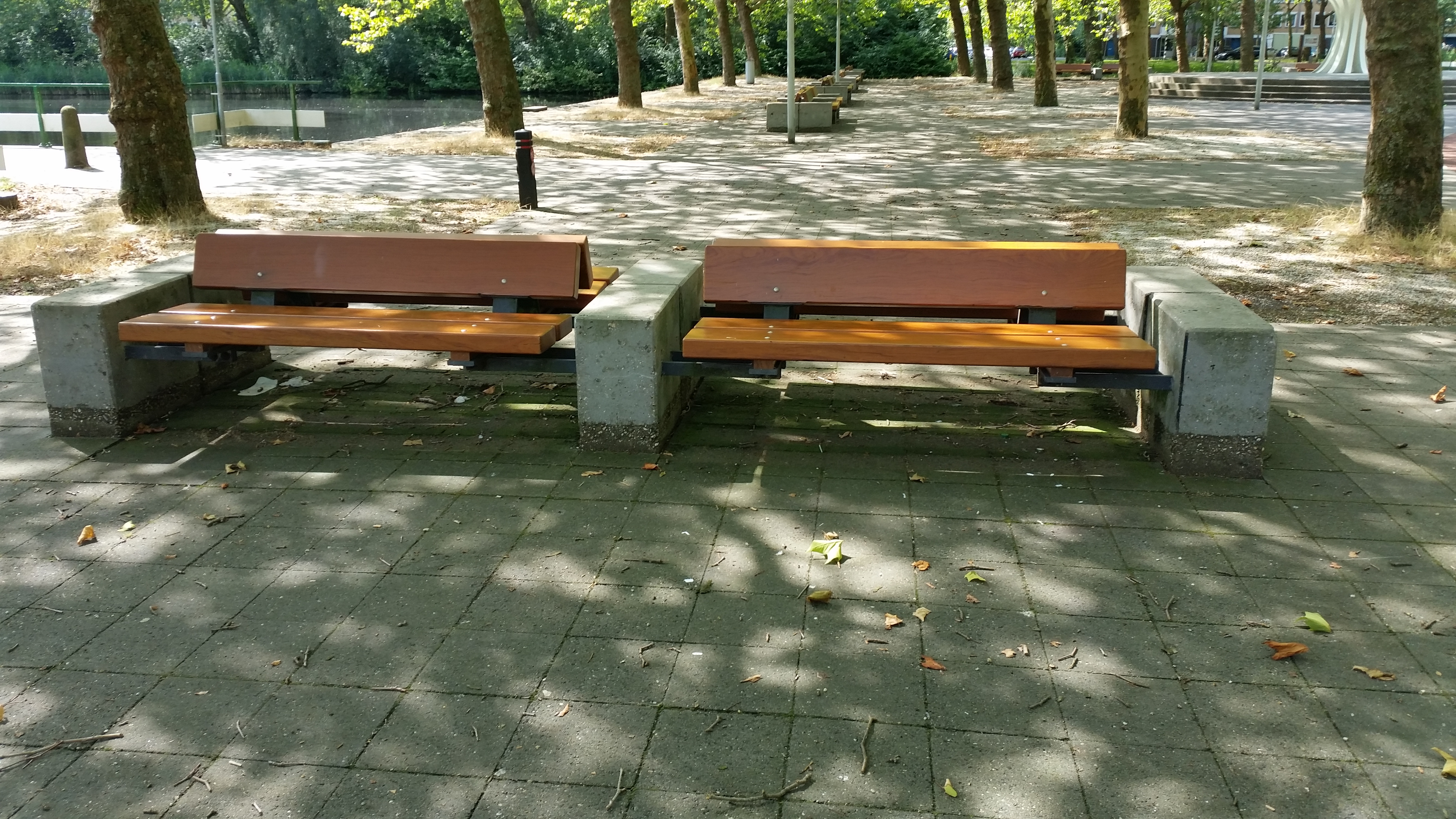 Bankjes in het Gijsbrecht van Aemstelpark, Amsterdam. Ontwerp is van Aldo van Eyck.